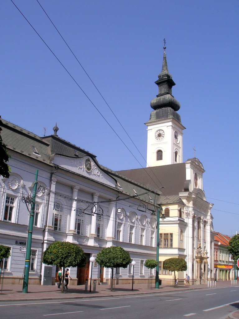 Mesto Prešov katedrálny chrám sv. Jána Krstiteľa, sídlo arcibiskupského gréckokatolíckeho úradu